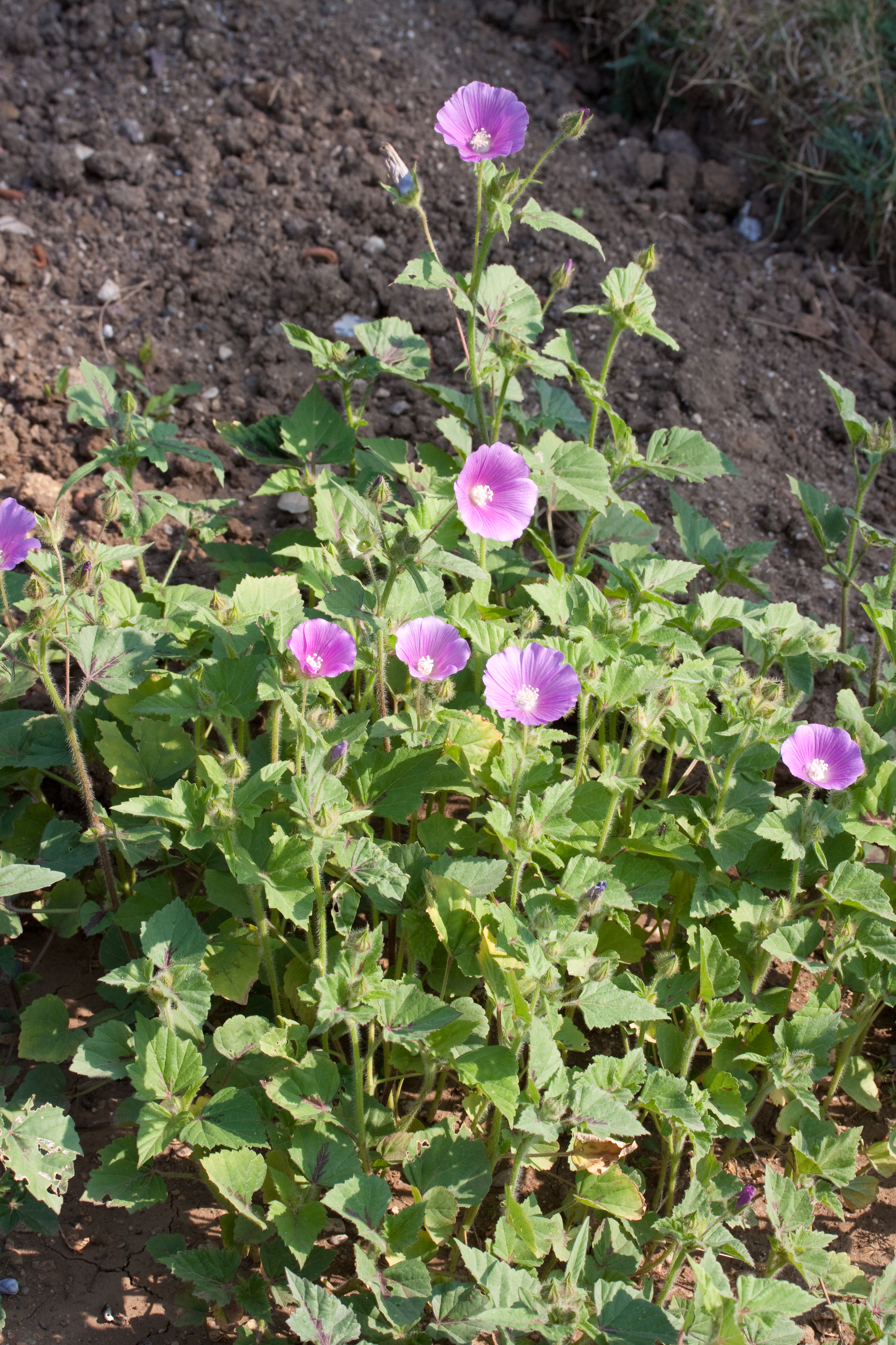 Floraison d'Anoda cristata - Jardin des Plantes - Paris - France